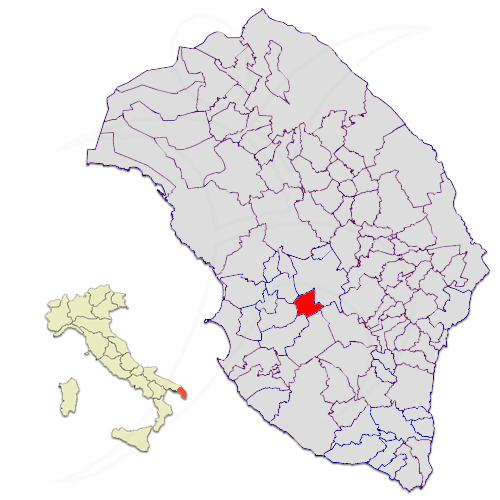 Il comune di Collepasso nella provincia di Lecce